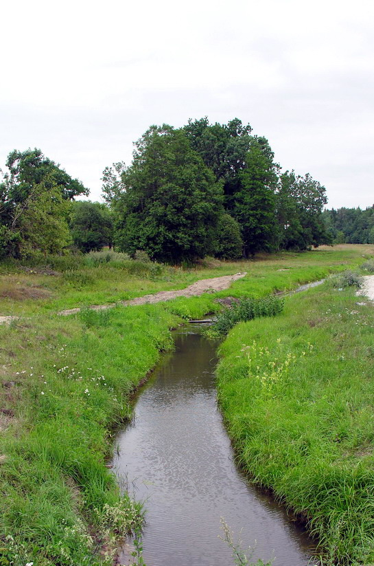 Stulpas, upė Mažeikių raj., Tirkšlių seniūnijoje, Viešetės deš. intakas. Foto: Algirdas, 2006 m. rugpjūčio 5 d., Lietuva